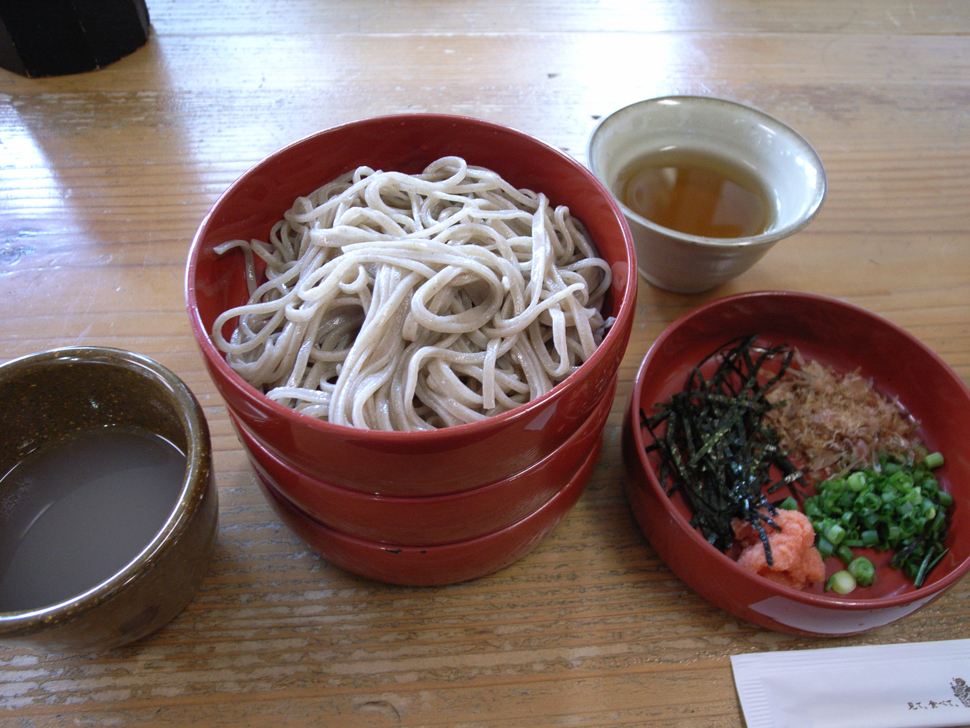 ３段６６０円